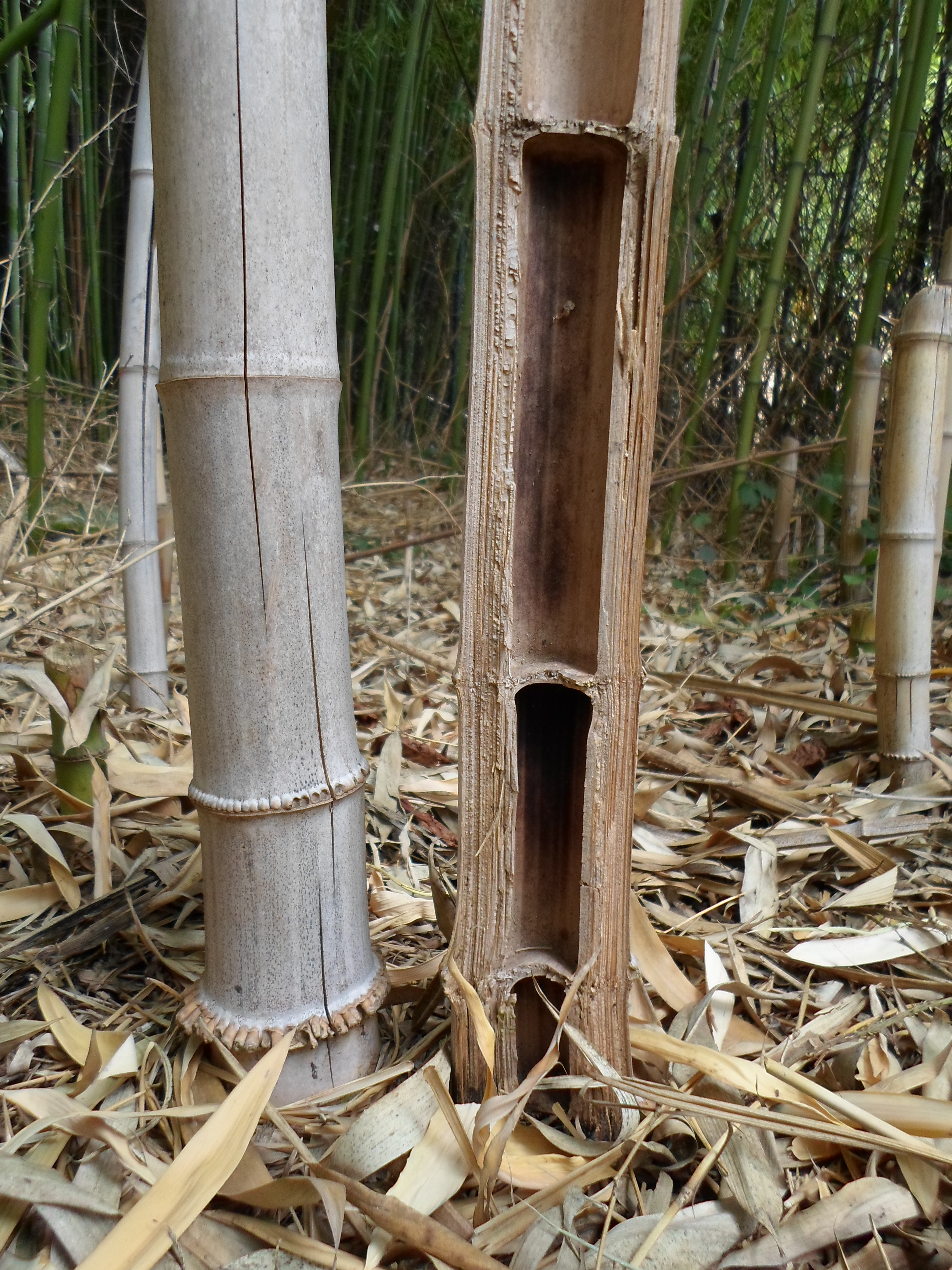 bambou, pied de chaume. Coupe verticale - cloison